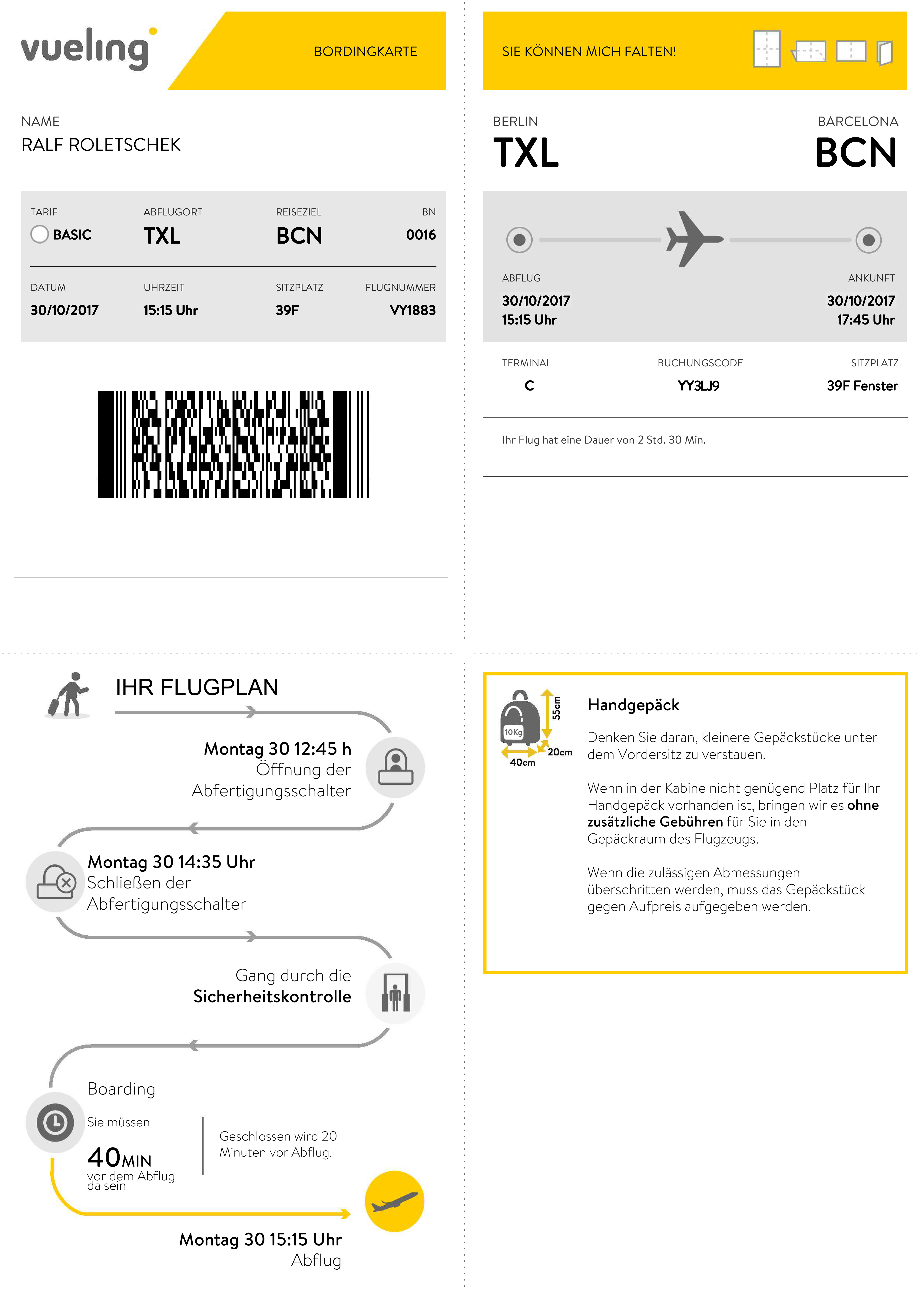 Bordkarte Vueling